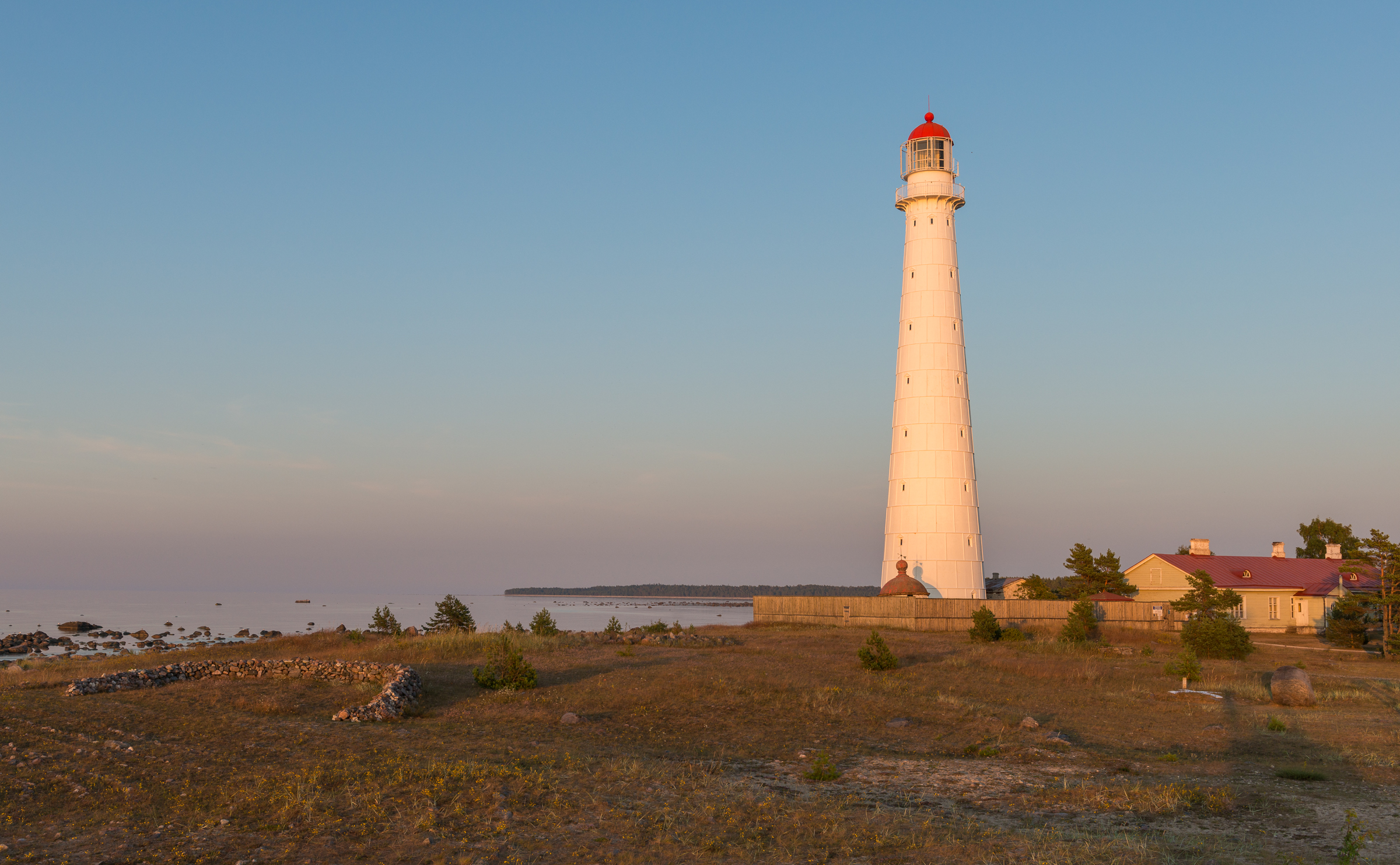 Tahkuna tuletorn Hiiumaal, päikeseloojanguvalguses